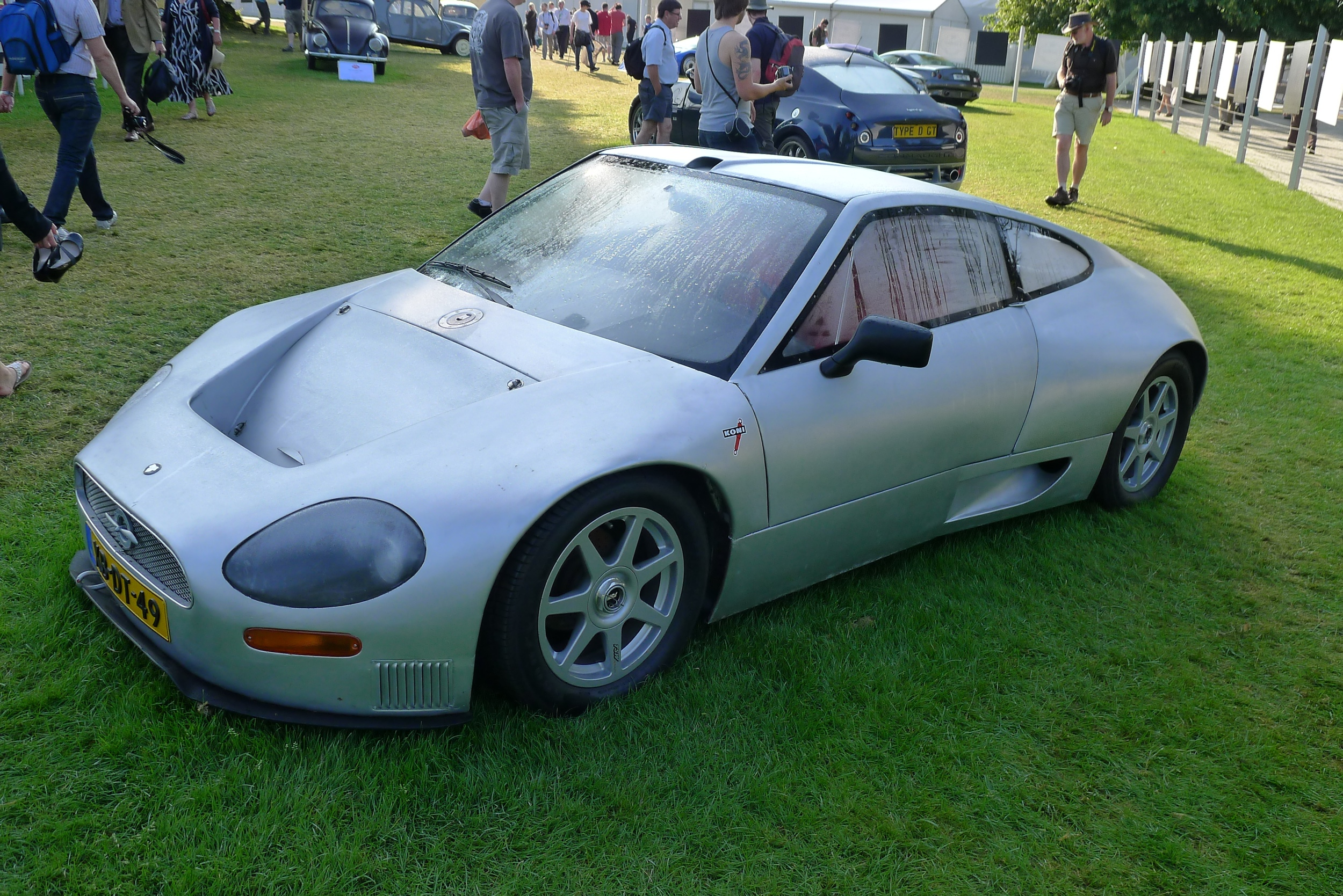 Spyker Silvestris V8